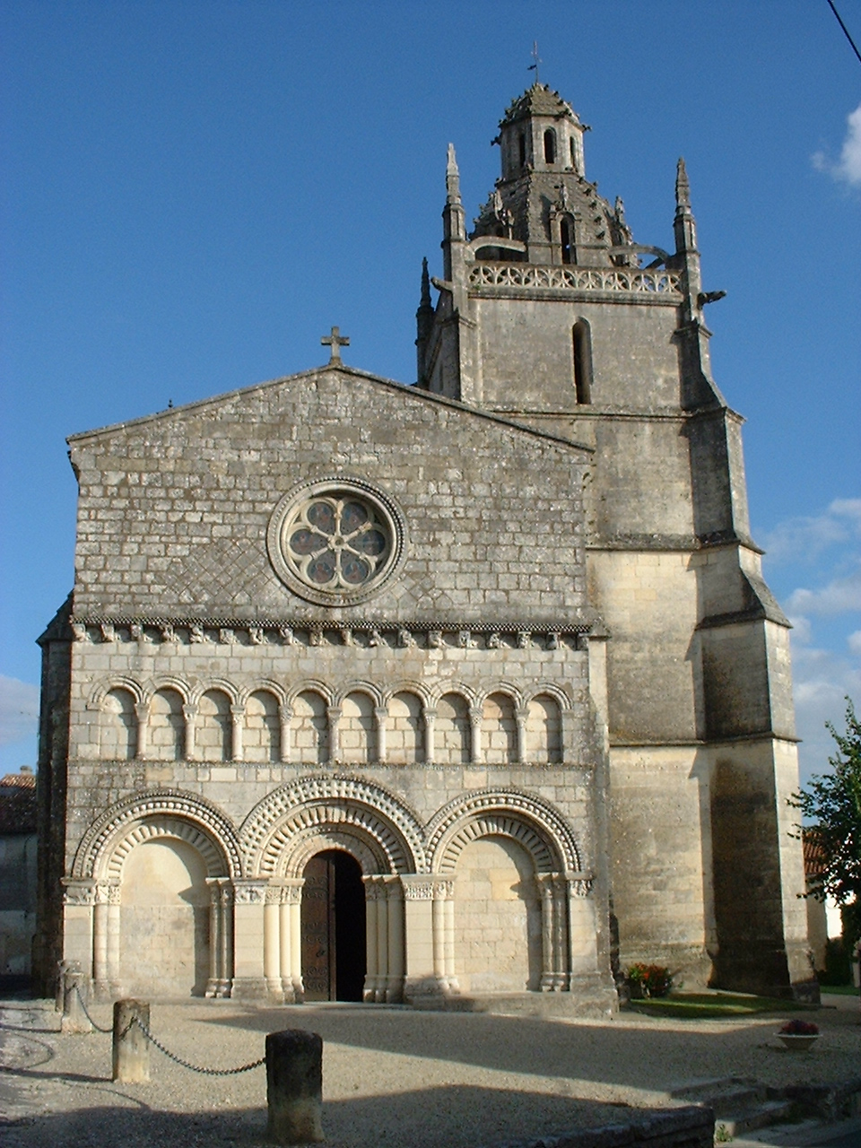 église de Saint-Fort sur Gironde Photo personelle du 31 aout 2004 Ã 18h38 NaSH 31 aoÃ»t 2004 Ã 22:36 (CEST)